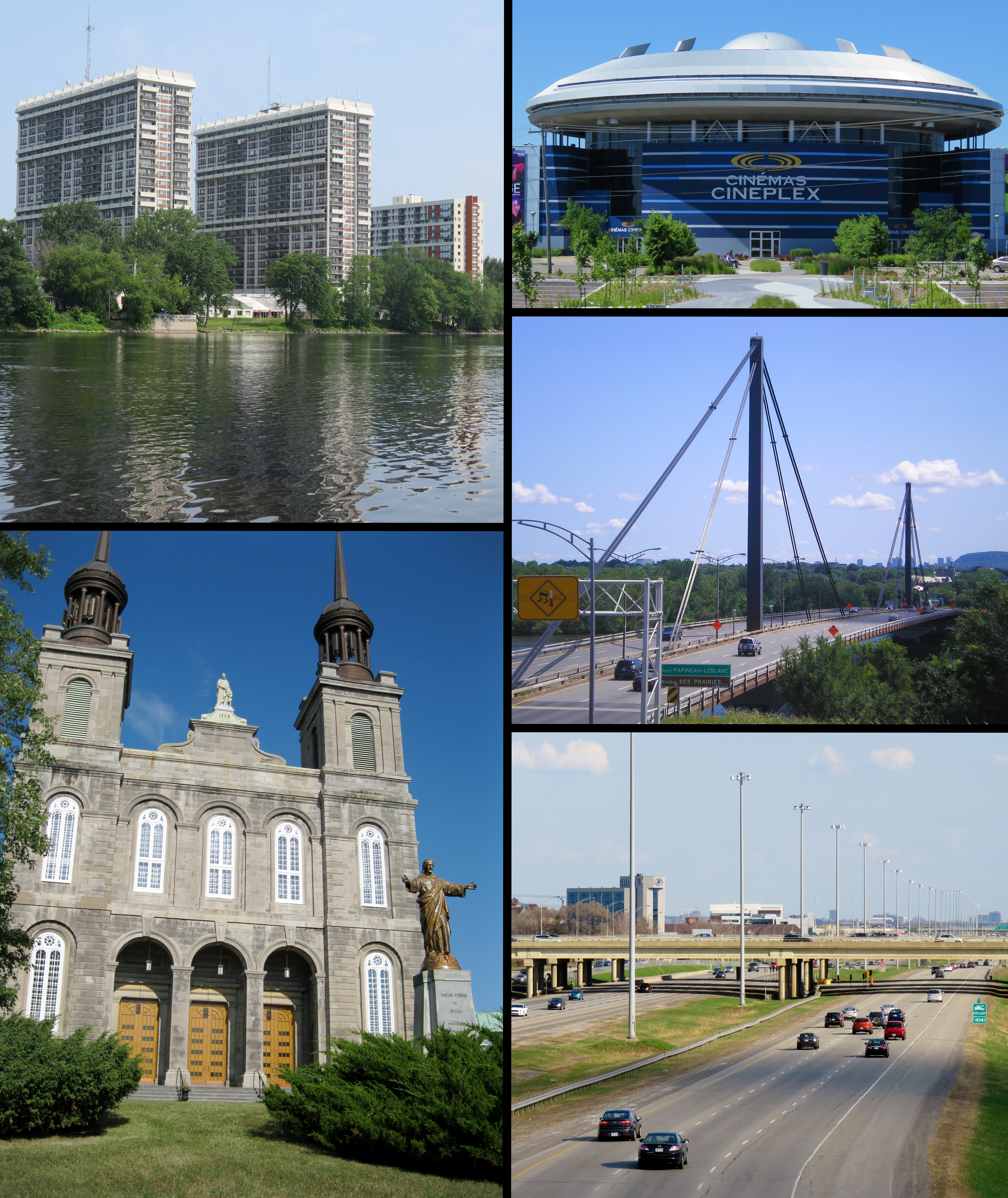 Montage réalisé avec